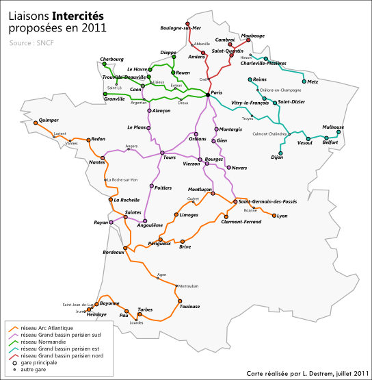 Carte du réseau Intercités de la SNCF